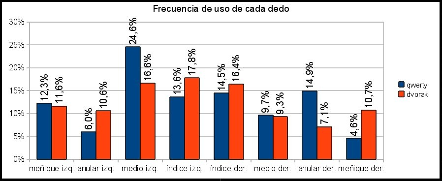 Frecuencias de uso de cada dedo al escribir sobre teclados QWERTY y Dvorak un texto en español